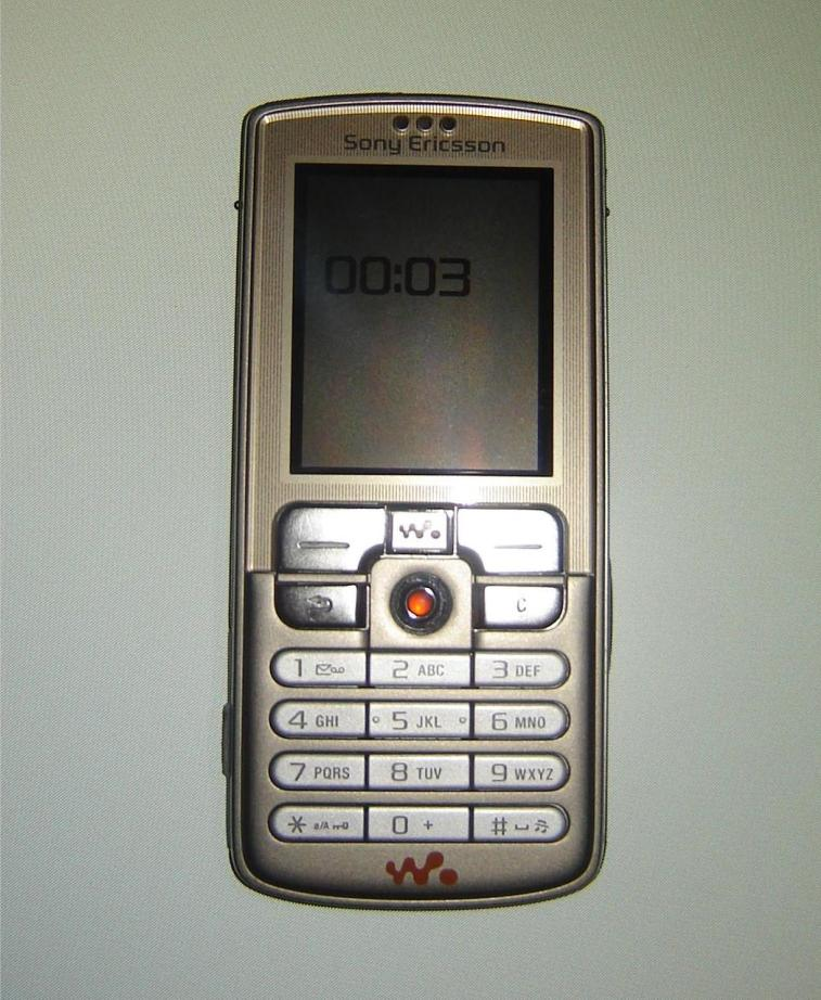 Сони Ериксон W700i